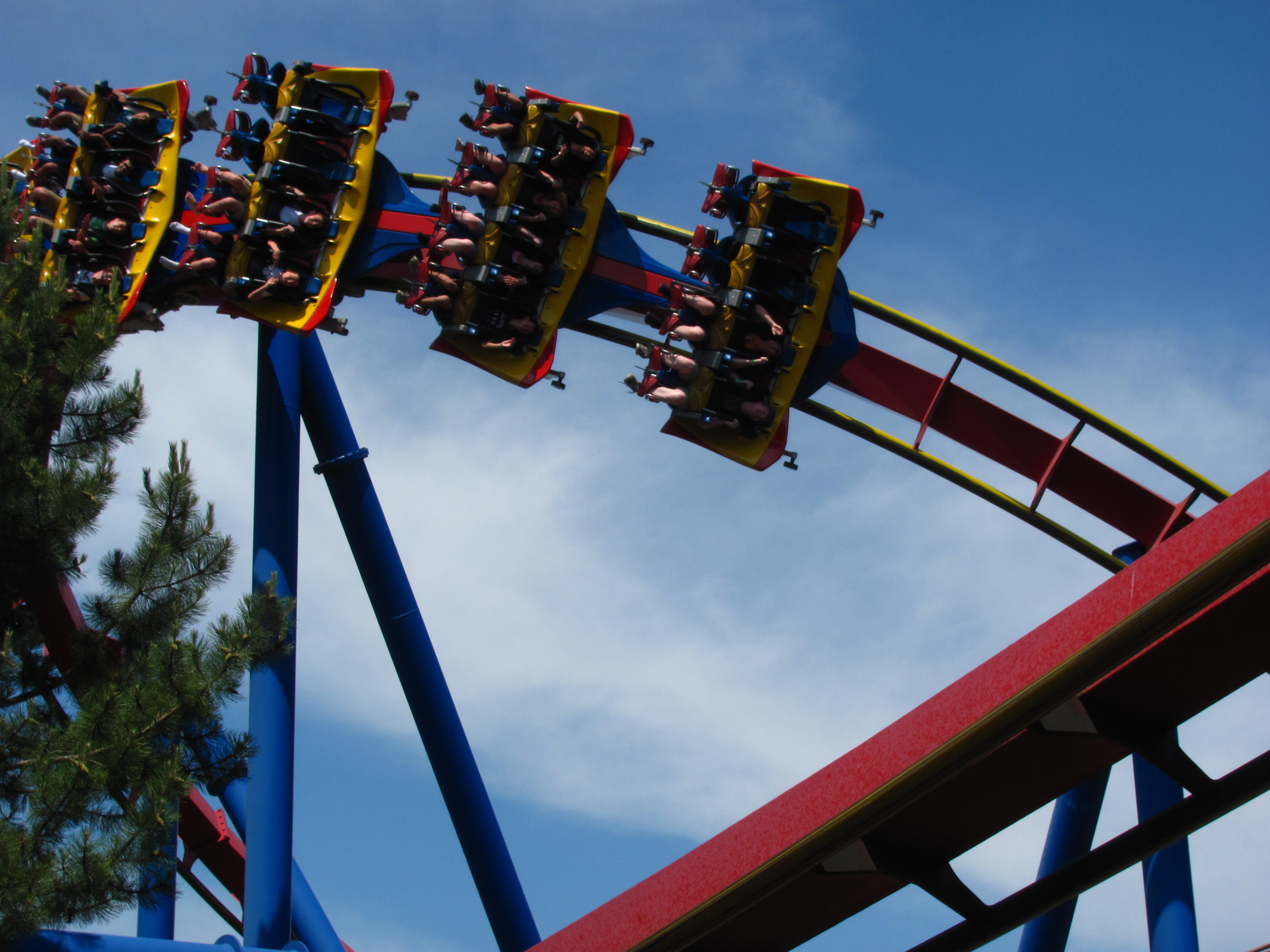 Superman: Ultimate Flight